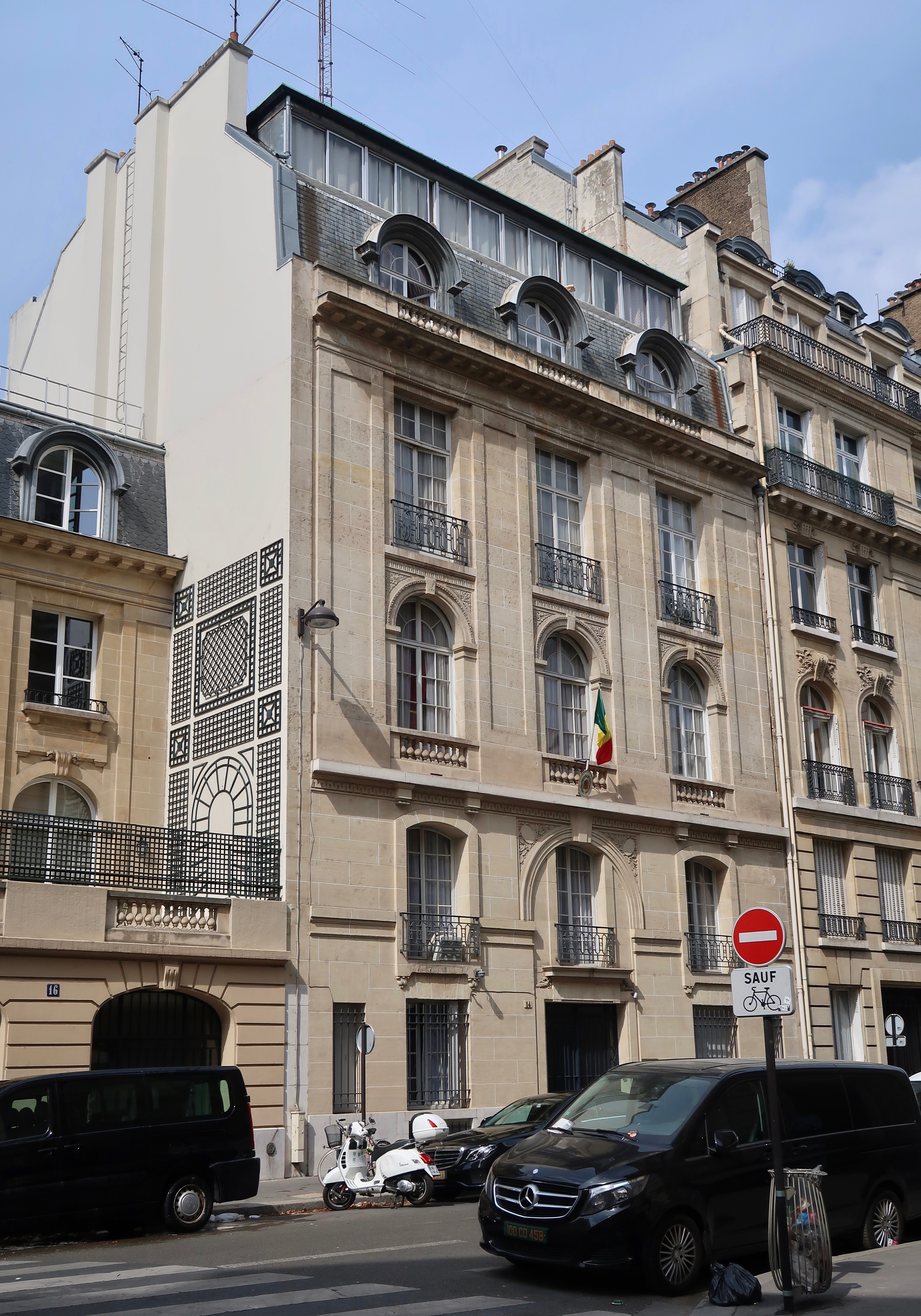 Ambassade du Sénégal en France, 14 avenue Robert-Schuman (Paris, 7e).